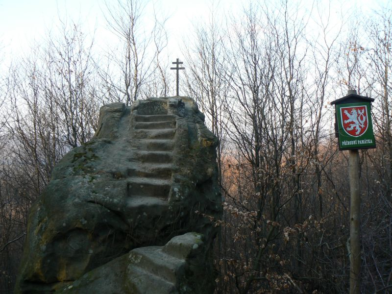 PP Kazatelna v Chřibech, ČR